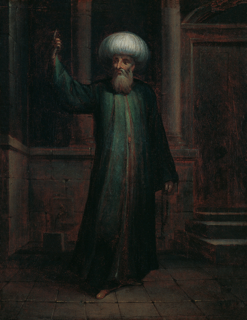 Şeyhülislam, Vanmour Okulu tuval üstüne yağlıboya 34 x 26 cm. (18. yüzyıl)